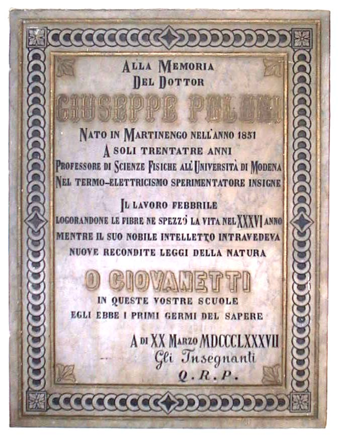 Lapide dedicata al fisico martinenghese dell'Ottocento Giuseppe Poloni, collocata nell'atrio d'ingresso della scuola media statale di Martinengo